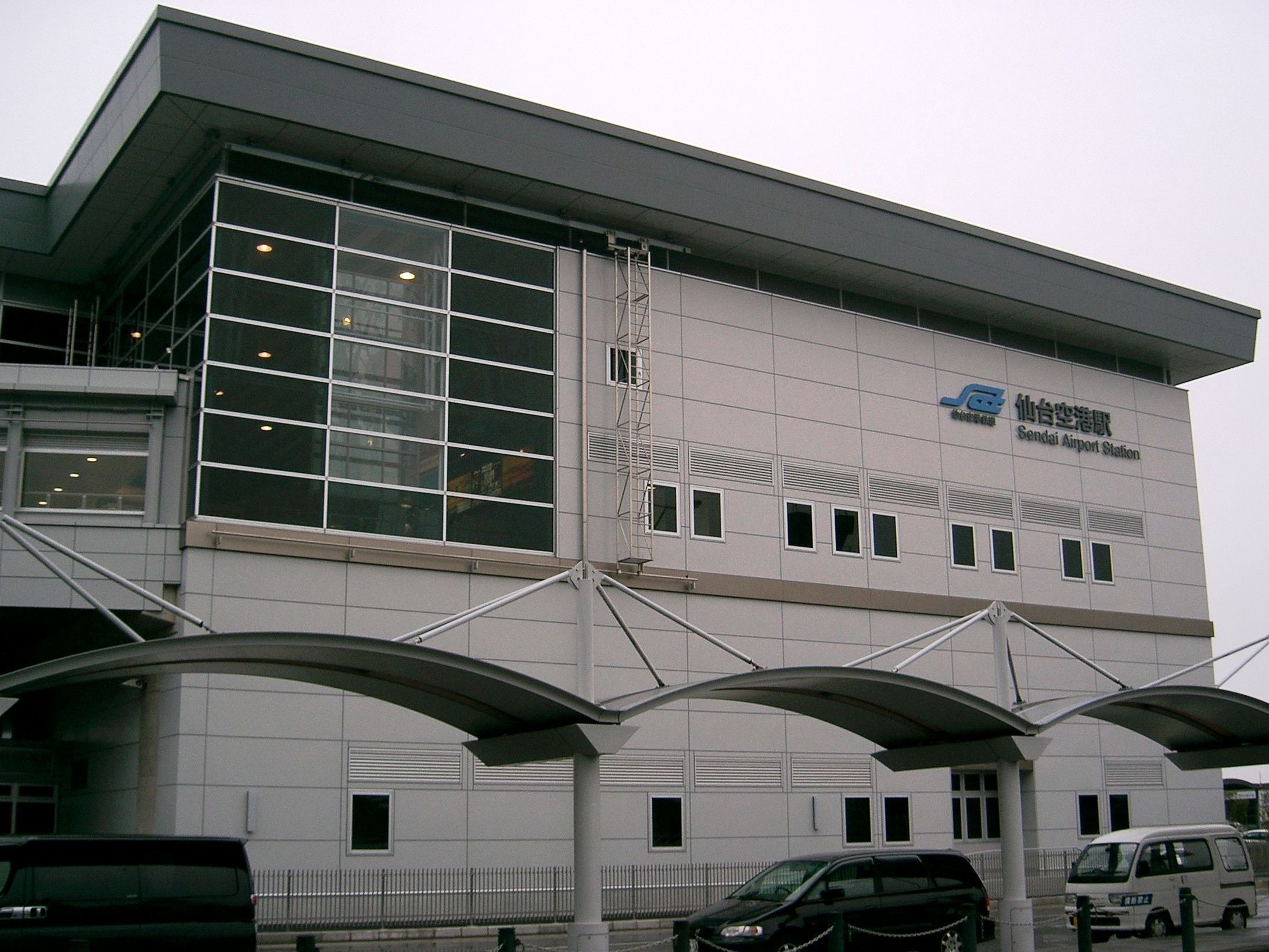 仙台空港駅Sendai Kuko (Sendai Airport) Rail Station, Japan